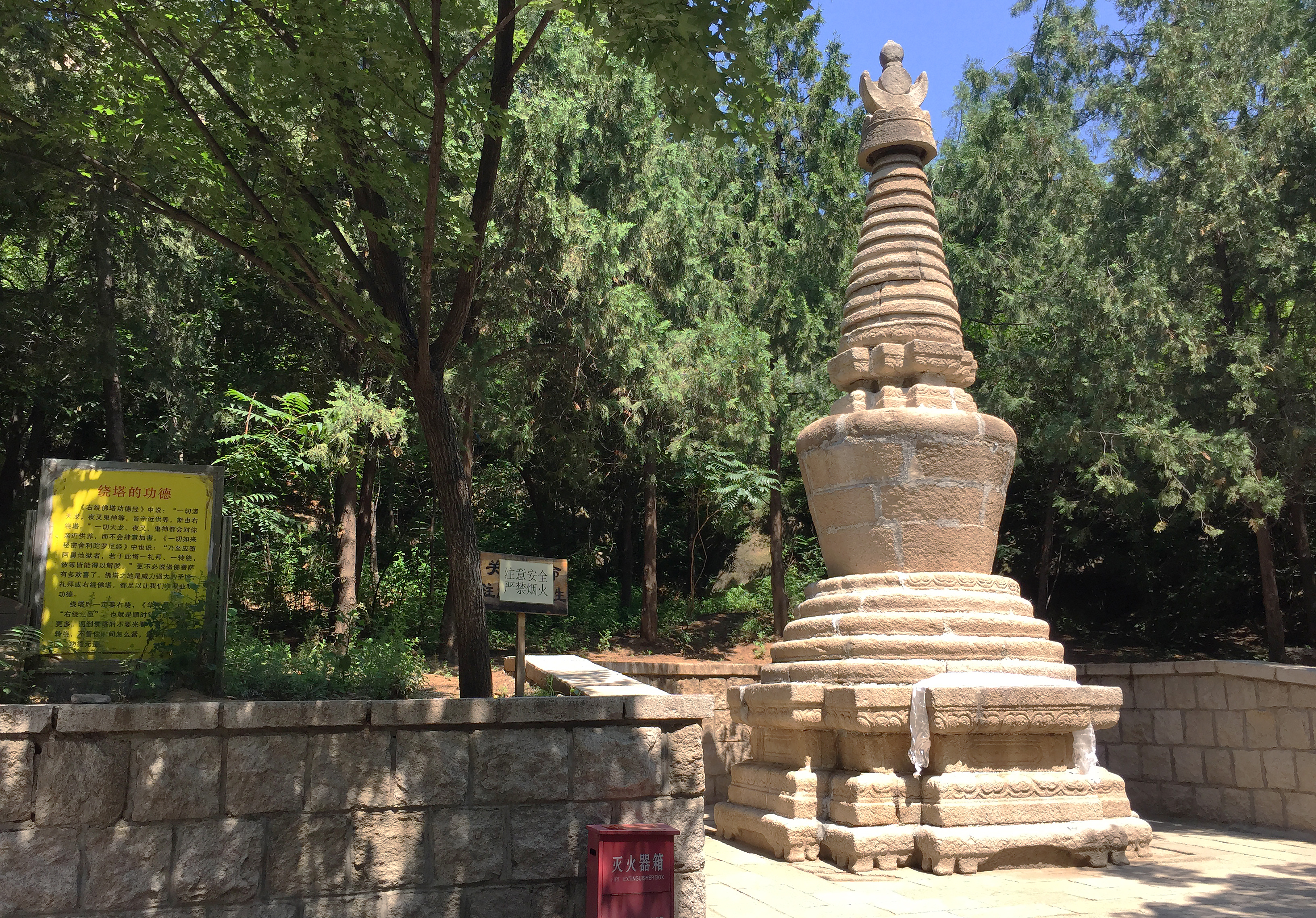 龙泉寺继升塔